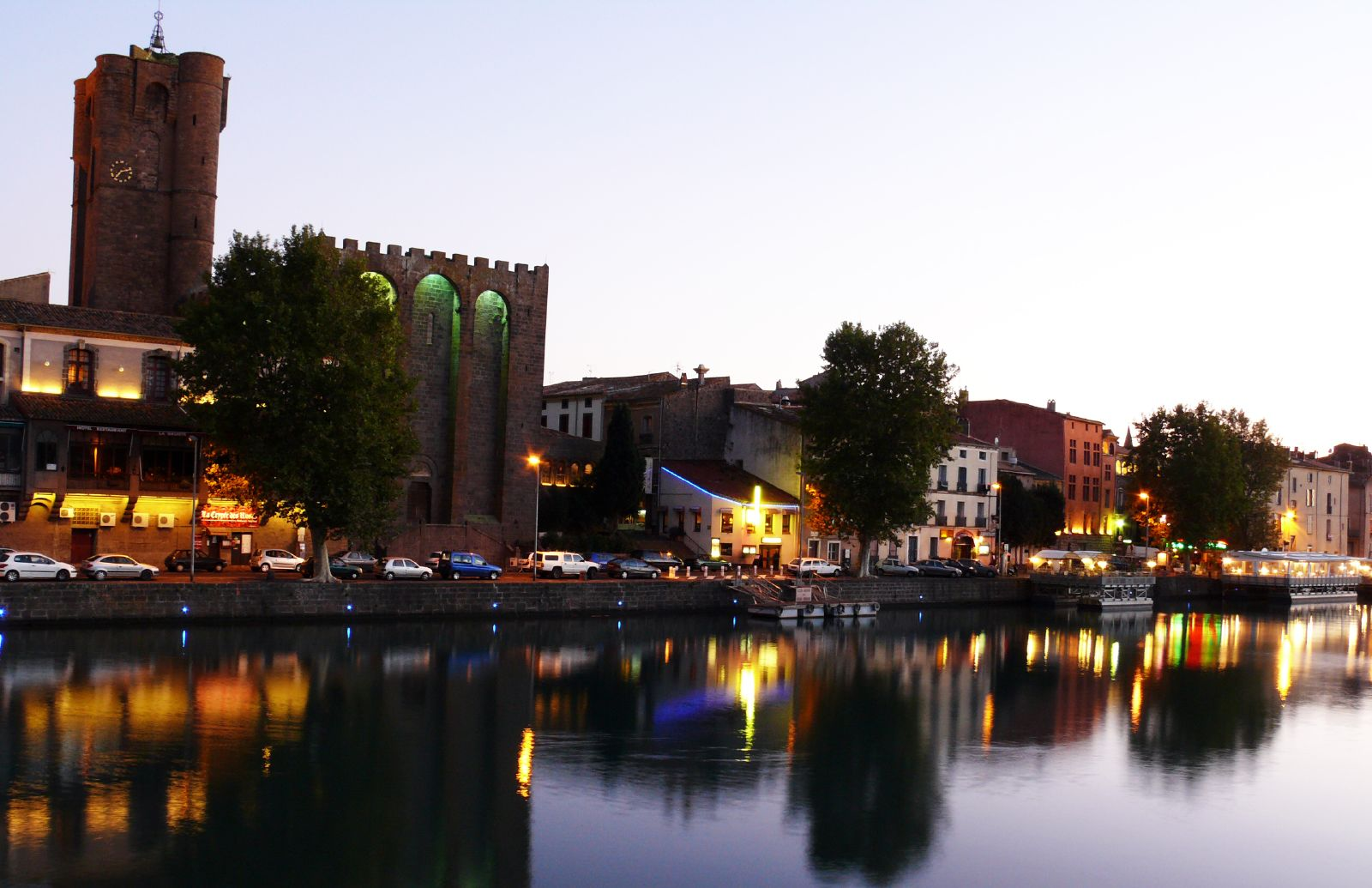 Vue d'Agde au crépuscule (cathédrale Saint-Étienne et quais de l'Hérault)